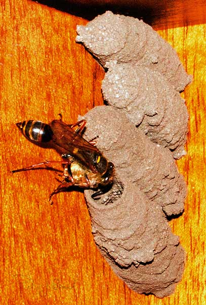 Sceliphron curvatum / Pélopée courbée construisant son nid